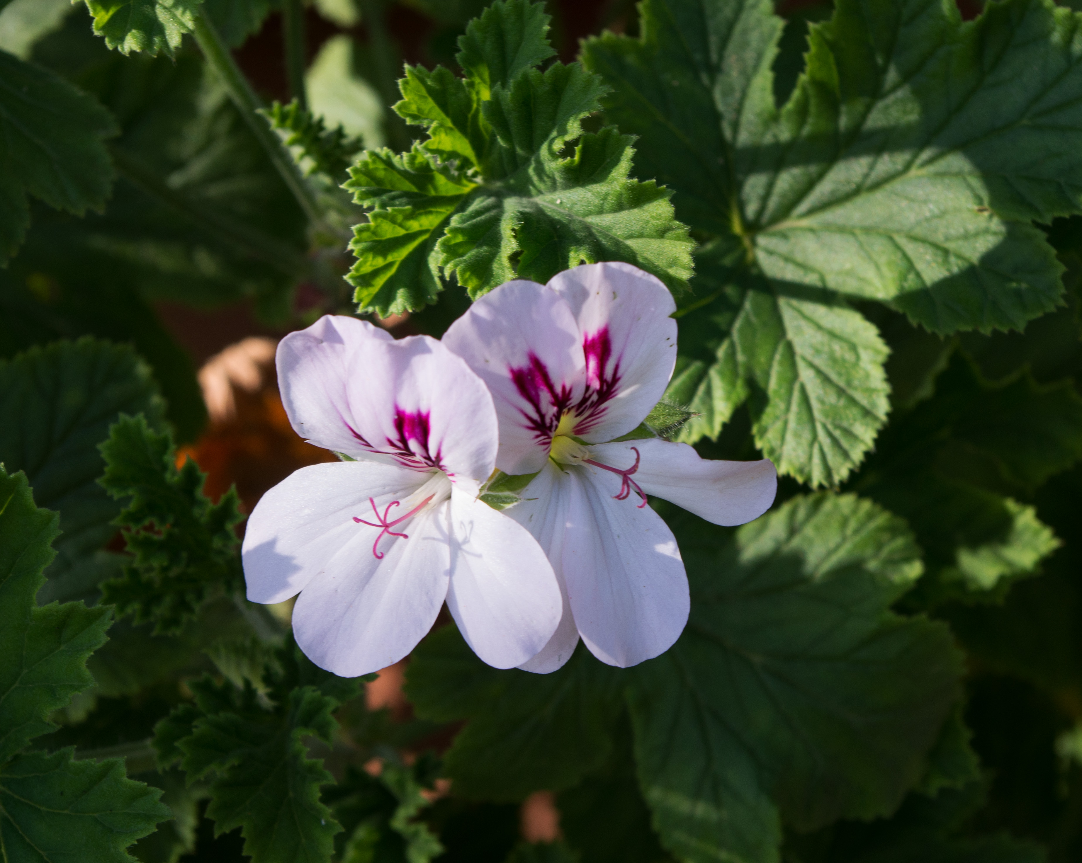 Pelargonium White Unique - hybride - Parc Floral